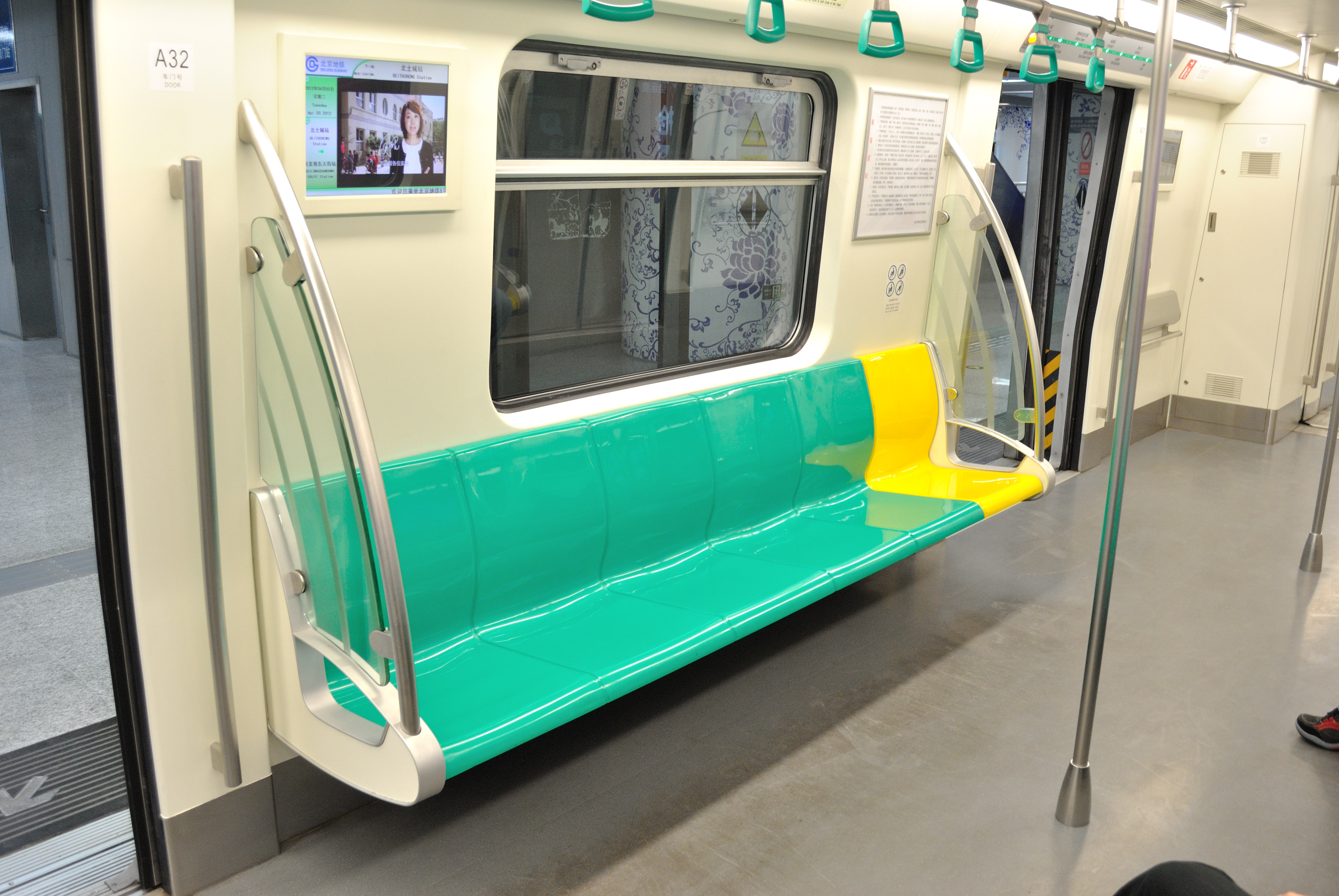 北京地铁8号线二期用车座椅